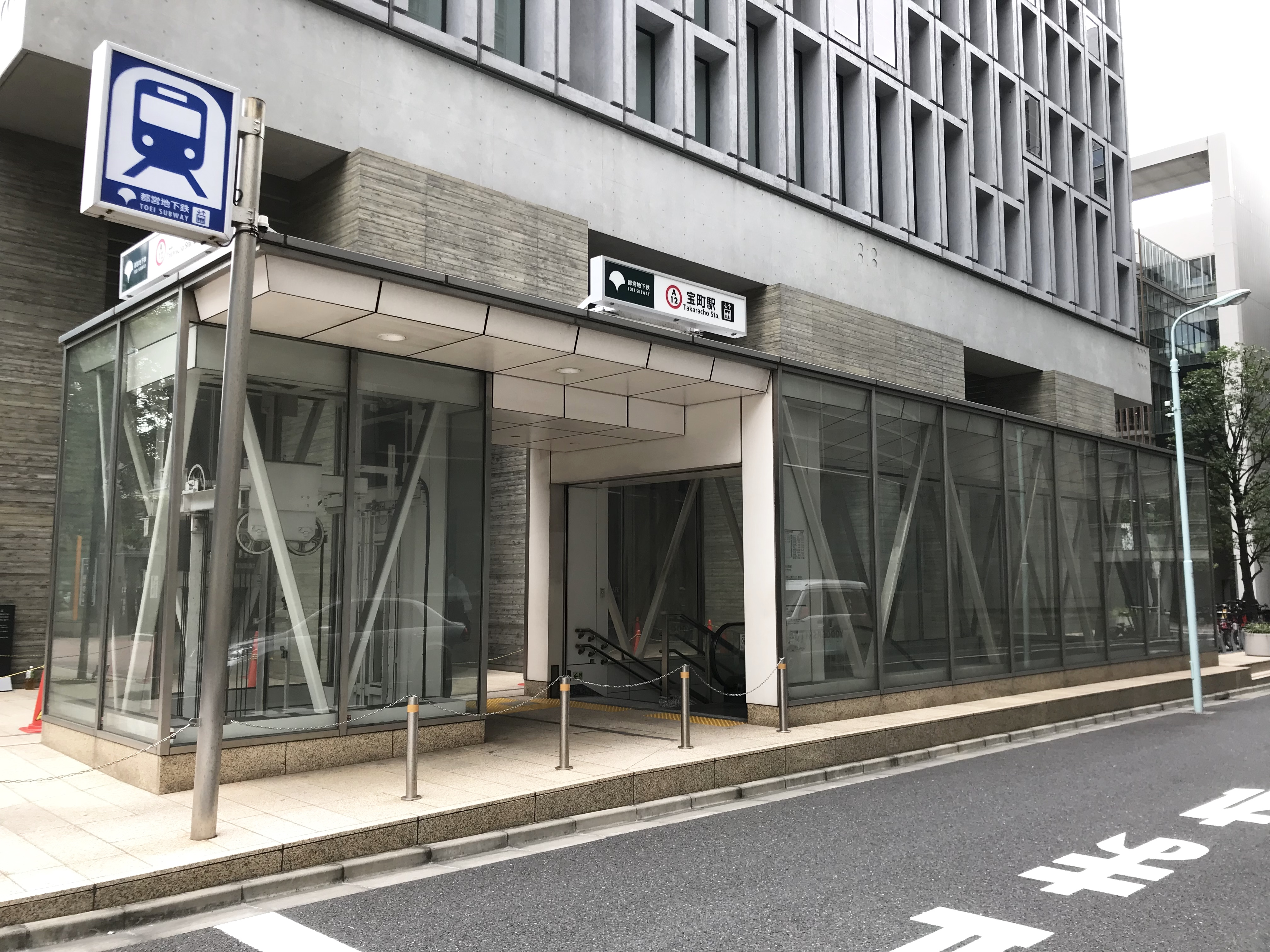 都営地下鉄浅草線宝町駅A8番出入口